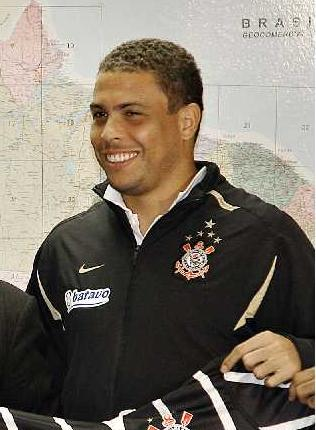 Der brasilianische Fußballer Ronaldo